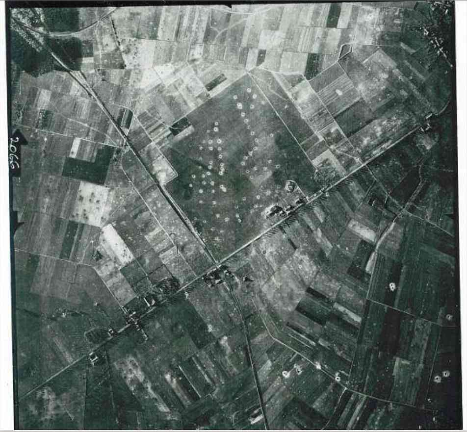 Flugfeld Merzbrück nach der Einnahme von Aachen durch die US-Armee